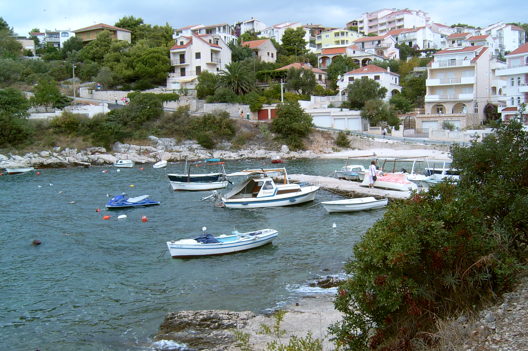 Chorwacja, Gornij Okrog na wyspie Ciovo